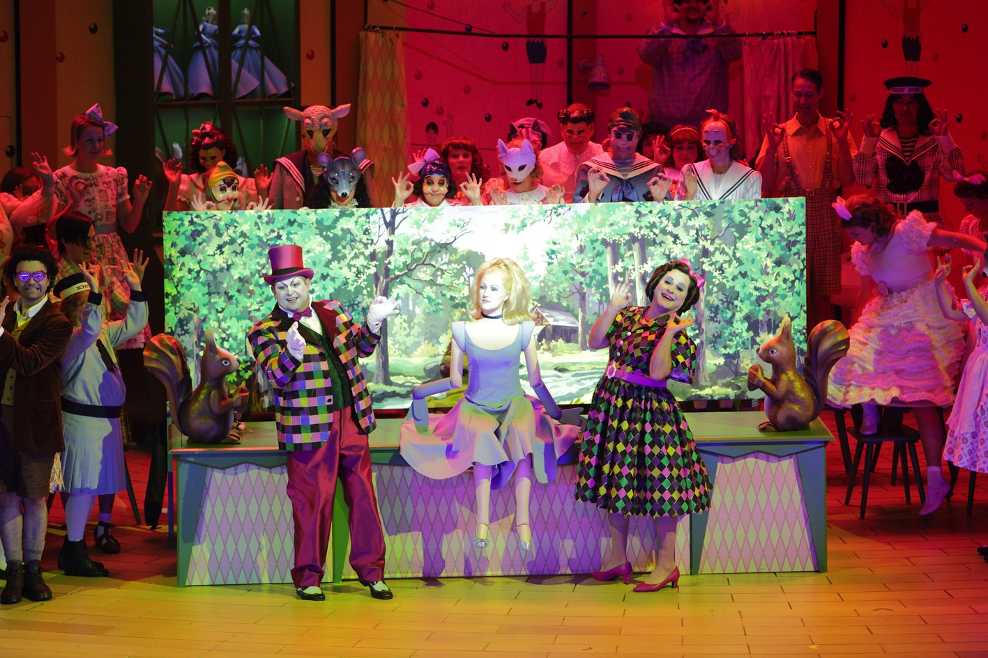 סיפורי הופמן 2012